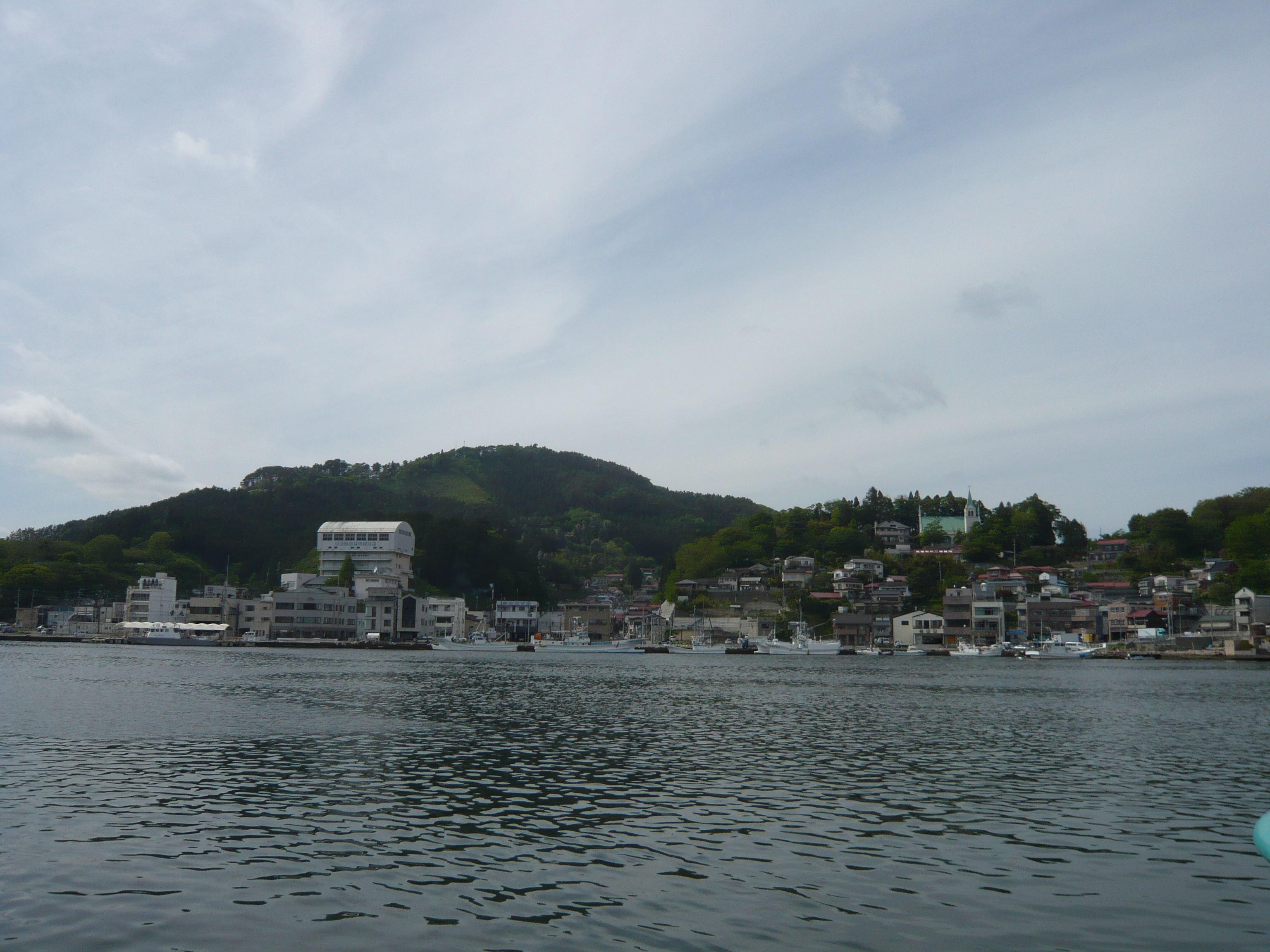 気仙沼湾、気仙沼お魚いちばから対岸を望む(2013年6月1日）